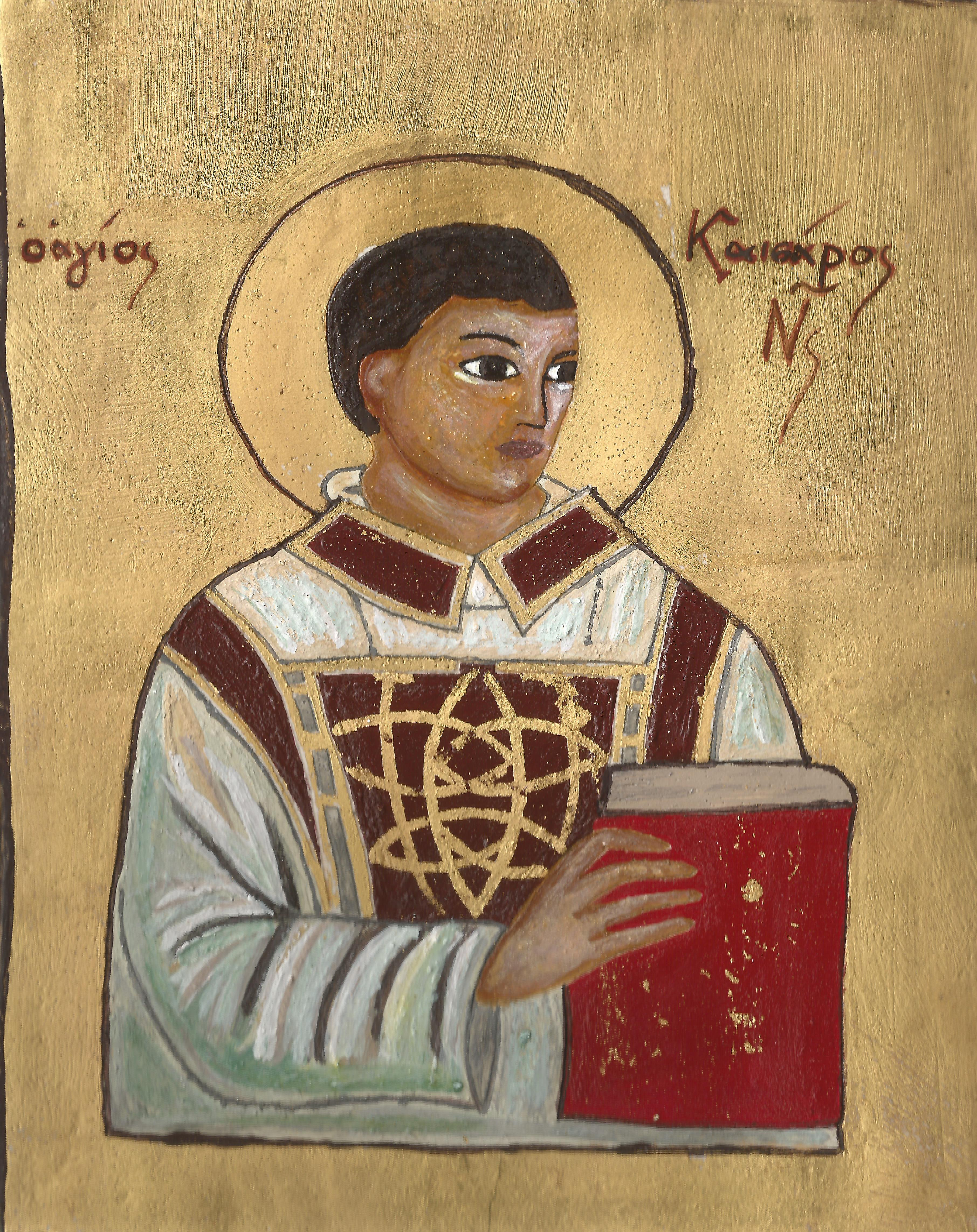 Św. Cezary z Nazjanzu